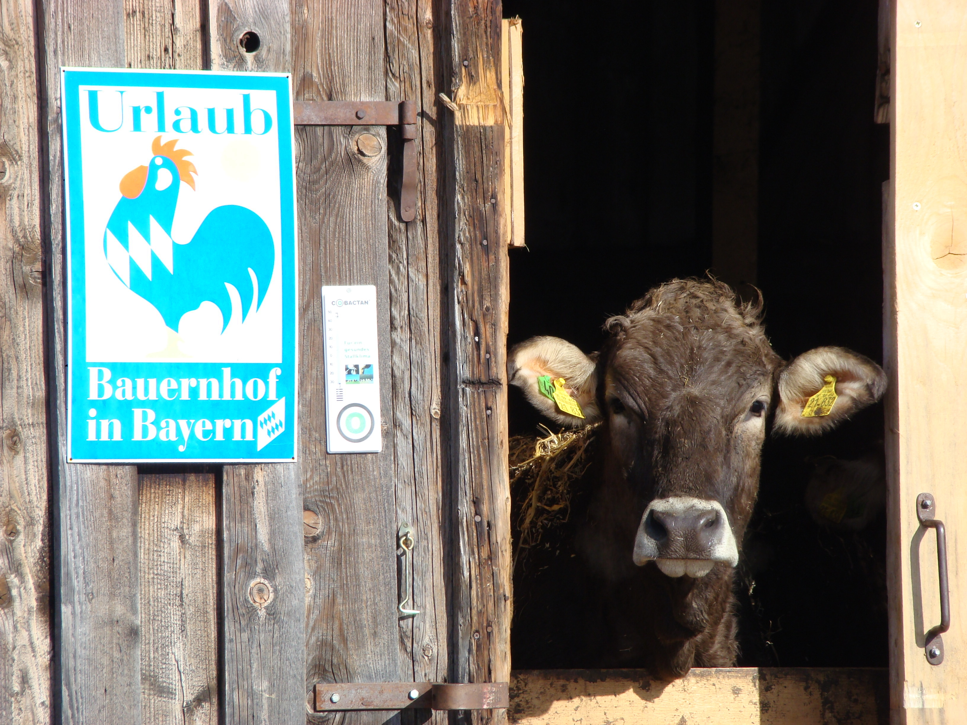 Rind auf Allgäuer Hof in Unterthalhofen, mit Plakat "Urlaub auf dem Bauernhof"